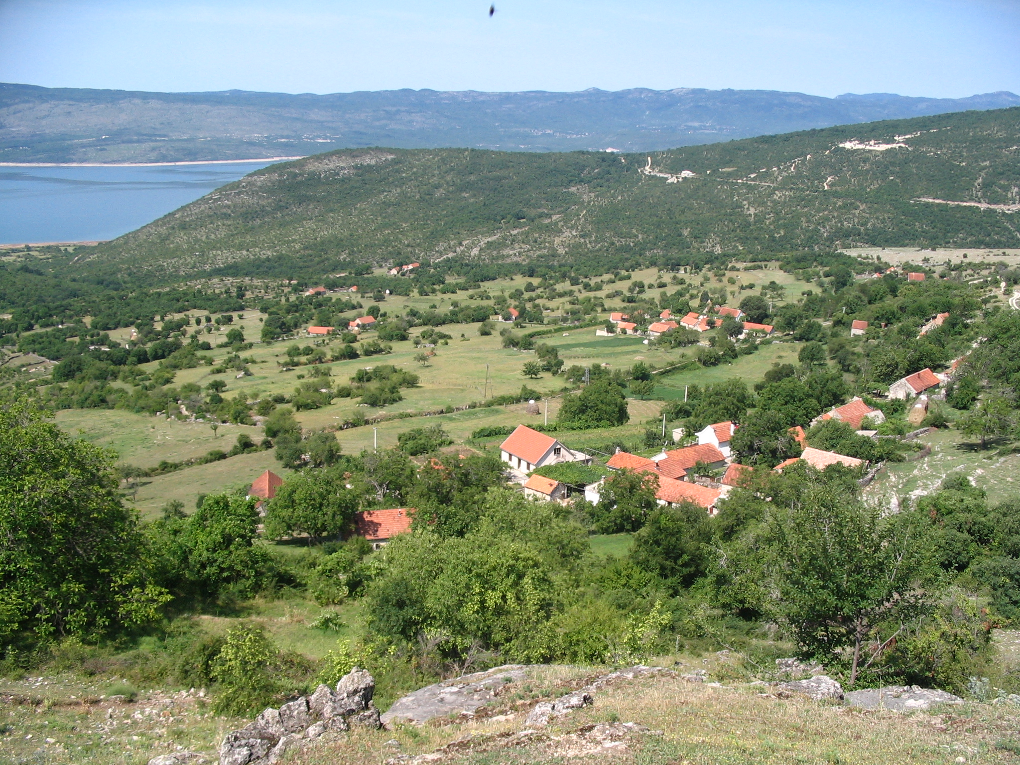 Фотографија села Коравлице